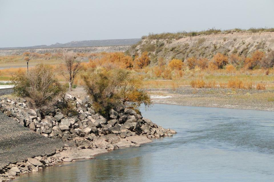 Rio Colorado en 25 de Mayo La Pampa